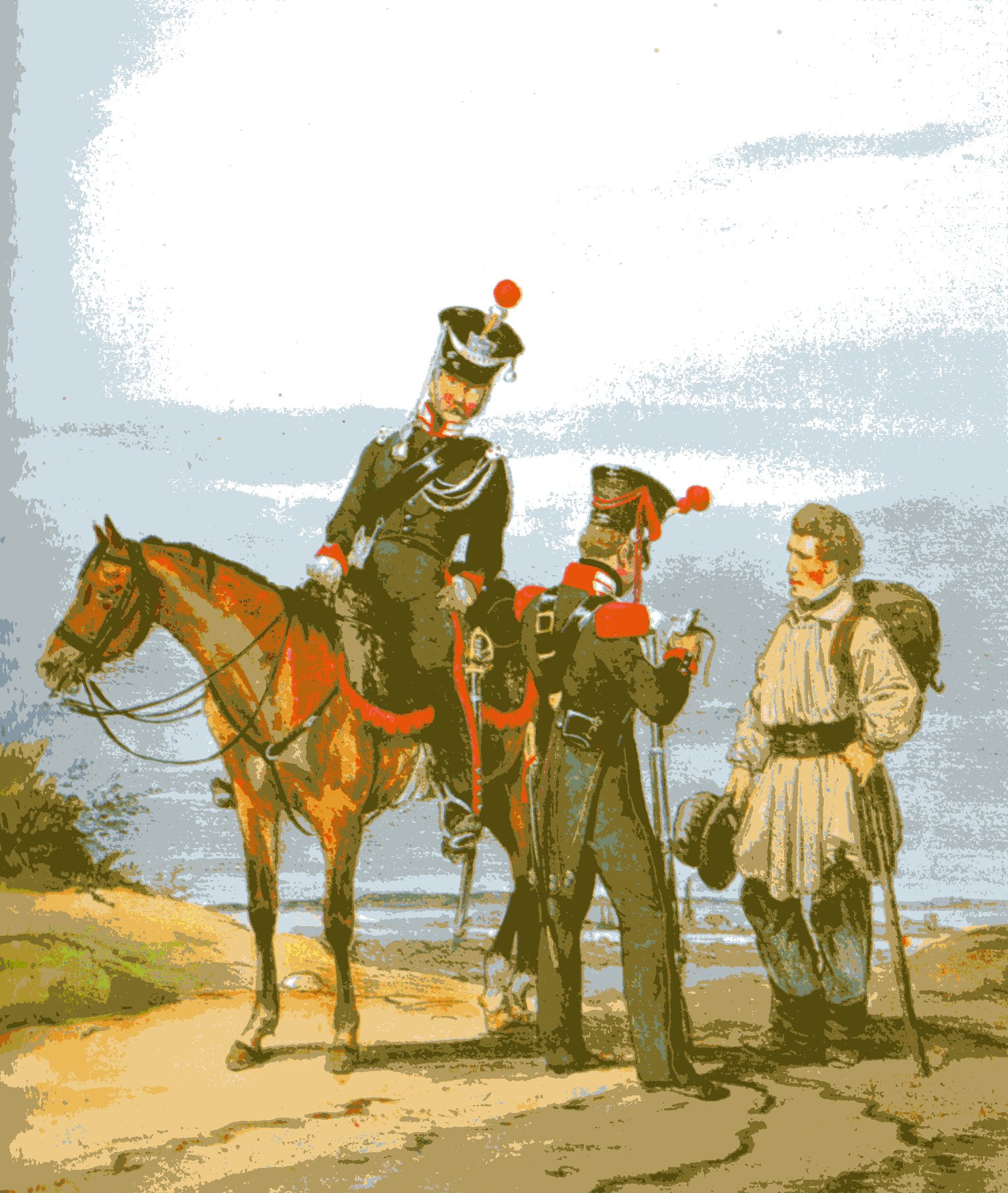 Großherzoglich Hessische Gendarmen zu Pferd und zu Fuß um 1840. Grüne Uniform, schwarzer Tschako